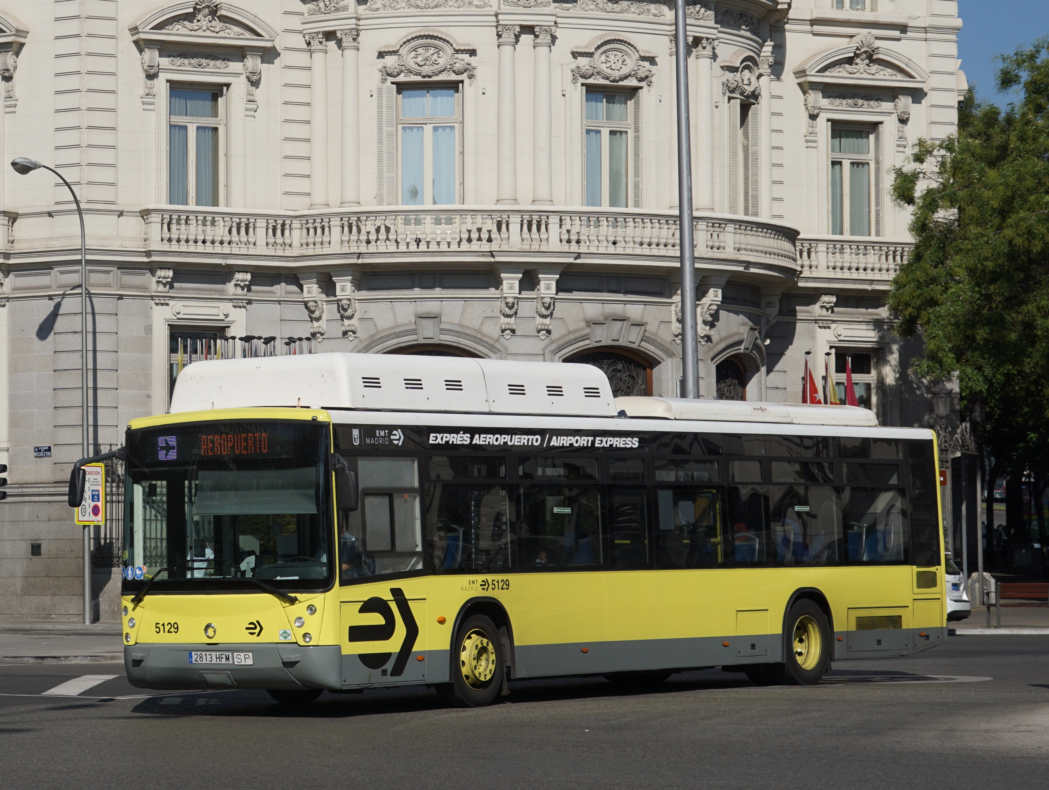 Express Aeropuerto EMT Madrid en la Plaza de la Cibeles, agosto 2020